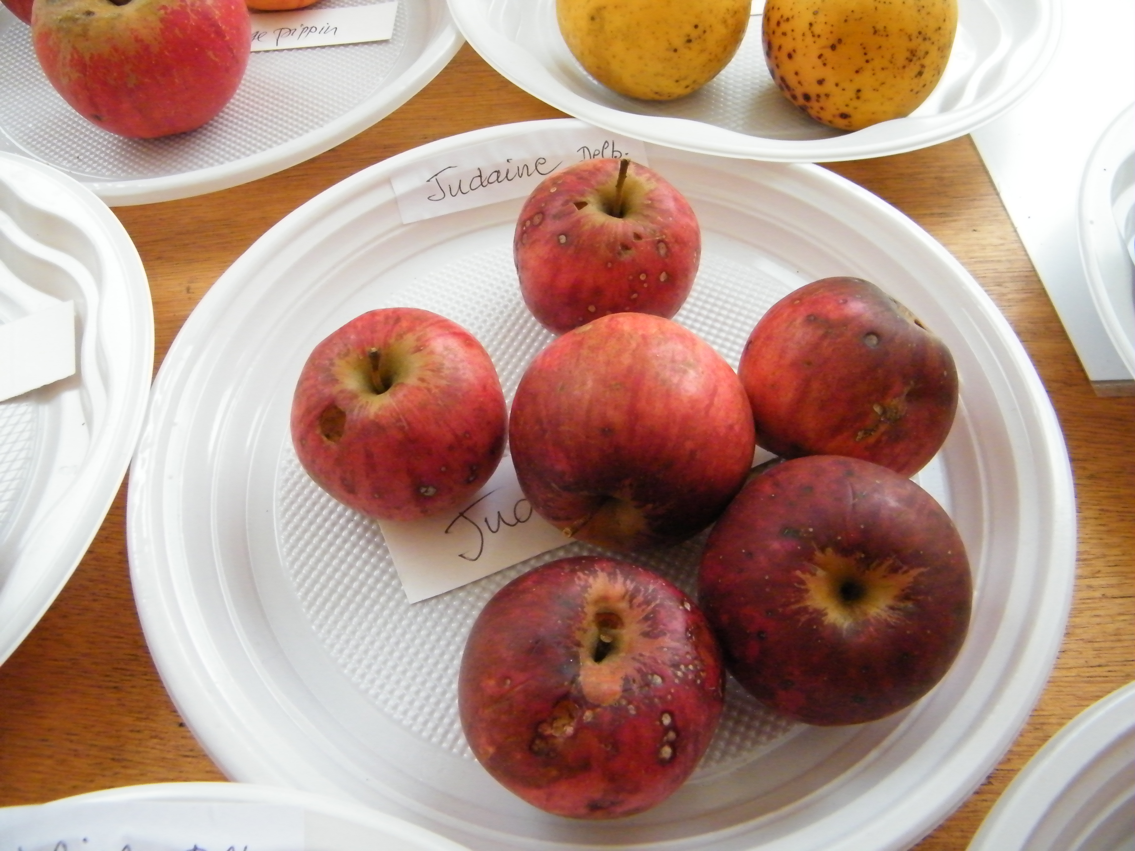 Judaine, pomme à cidre, Mons-Boubert, Somme, Fr, expo du 29-10-2017 (14).